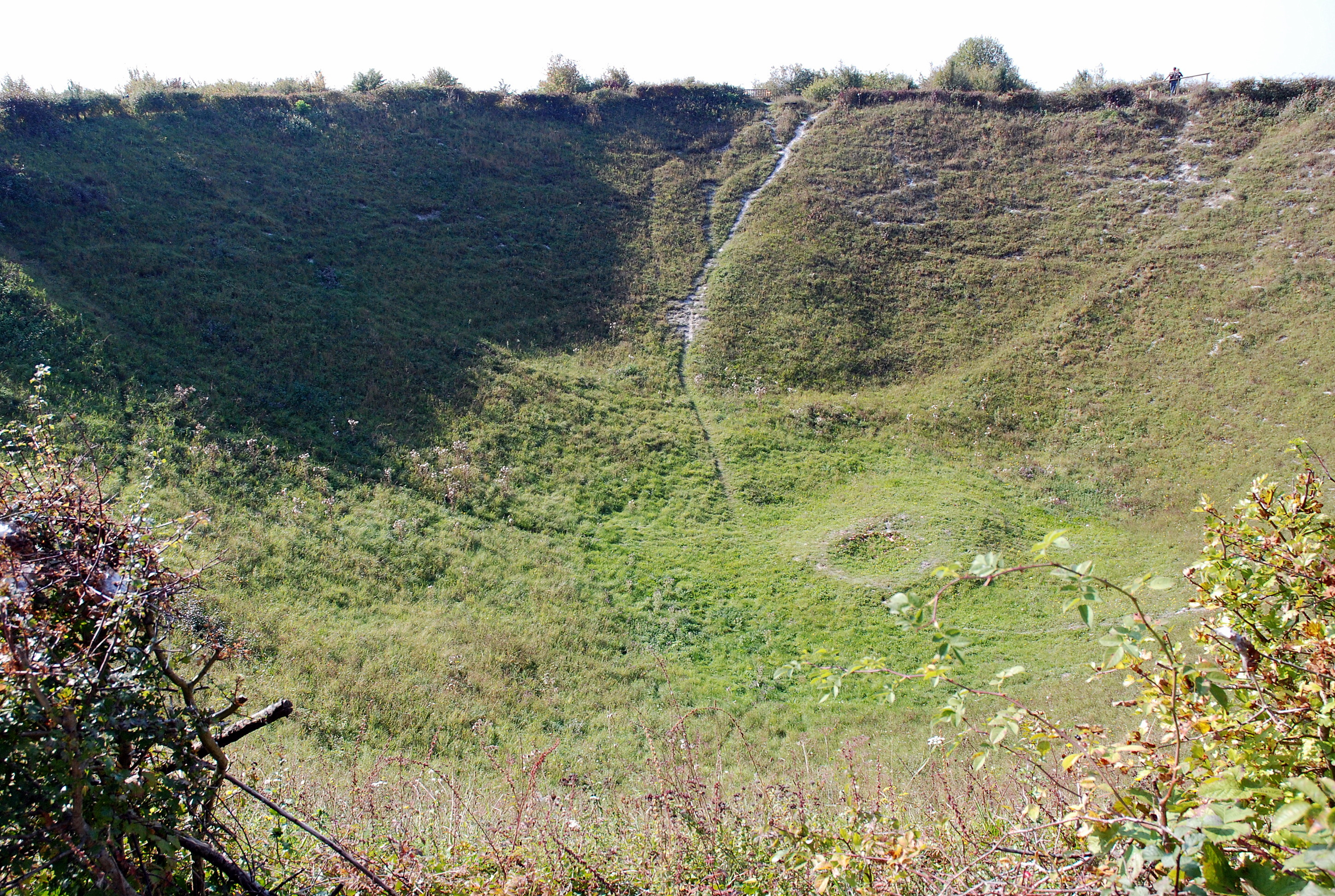 Lochnagar Crater in Ovillers-la-Boisselle, Frankrijk